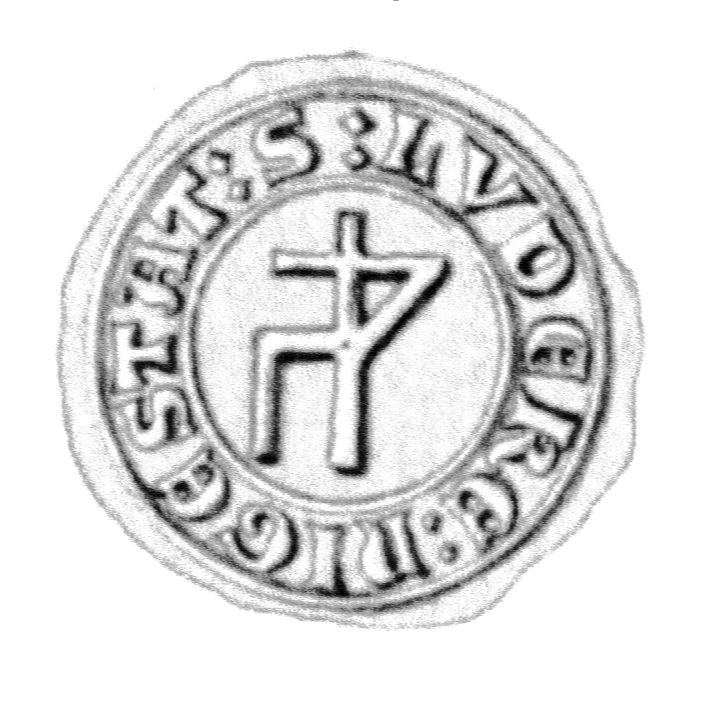 Siegel des Ratsmannes Ludeke Neystad. Das Siegel stammt aus der Zeit um 1412. Siehe Emil Ferdinand Fehling: Lübeckische Ratslinie, Nr. 480 (Ludeke Nyestadt).